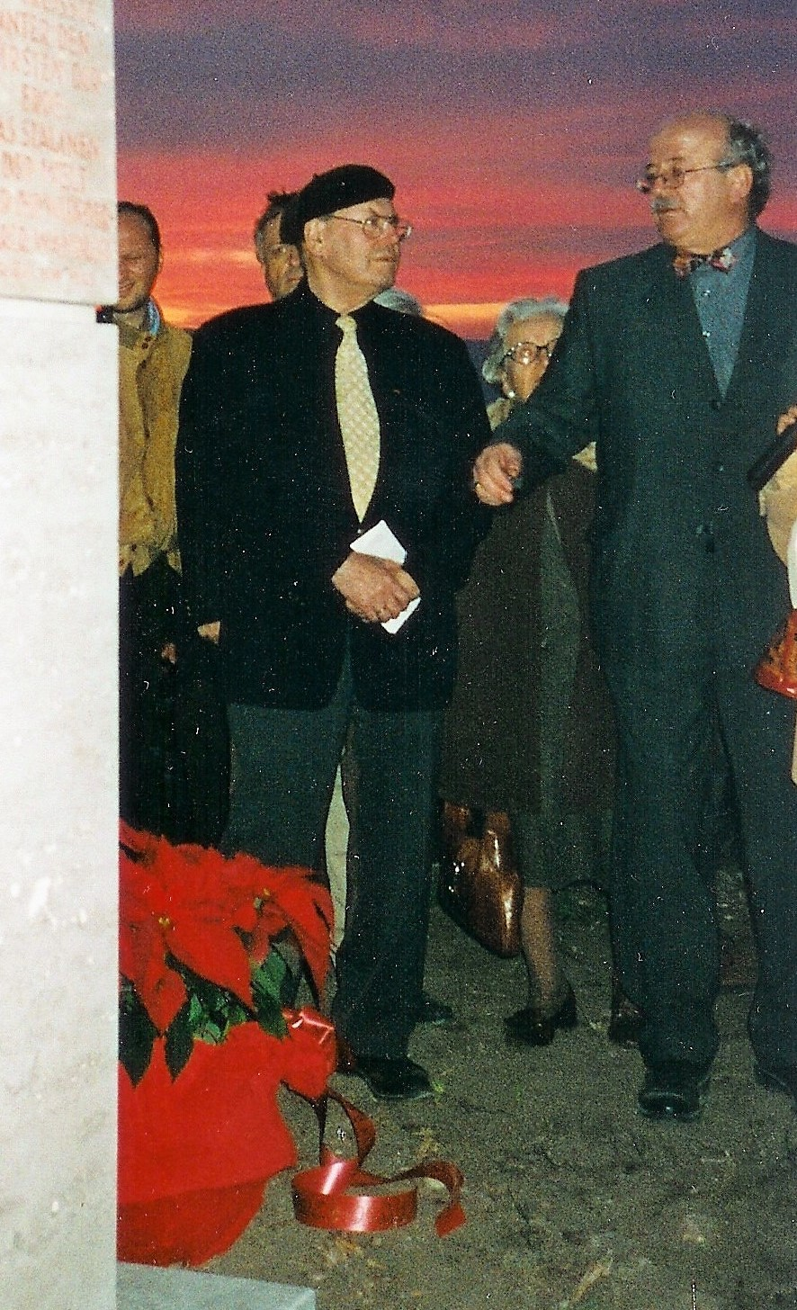 Gerhard Hertel mit Manfred Hartmmann (Reiseleiter und Urheber der Idee, die Stele aufzustellen) bei der Enthüllung der Kaiser-Friedrich-II.-Stele am Castel Fiorentino. Dahinter stehen teilweise verdeckt: der Bildhauer Markus Wolf (Autor der Stele) und der Historiker Gerhard Raff. Die Stele ist teilweise links im Bild sichtbar.